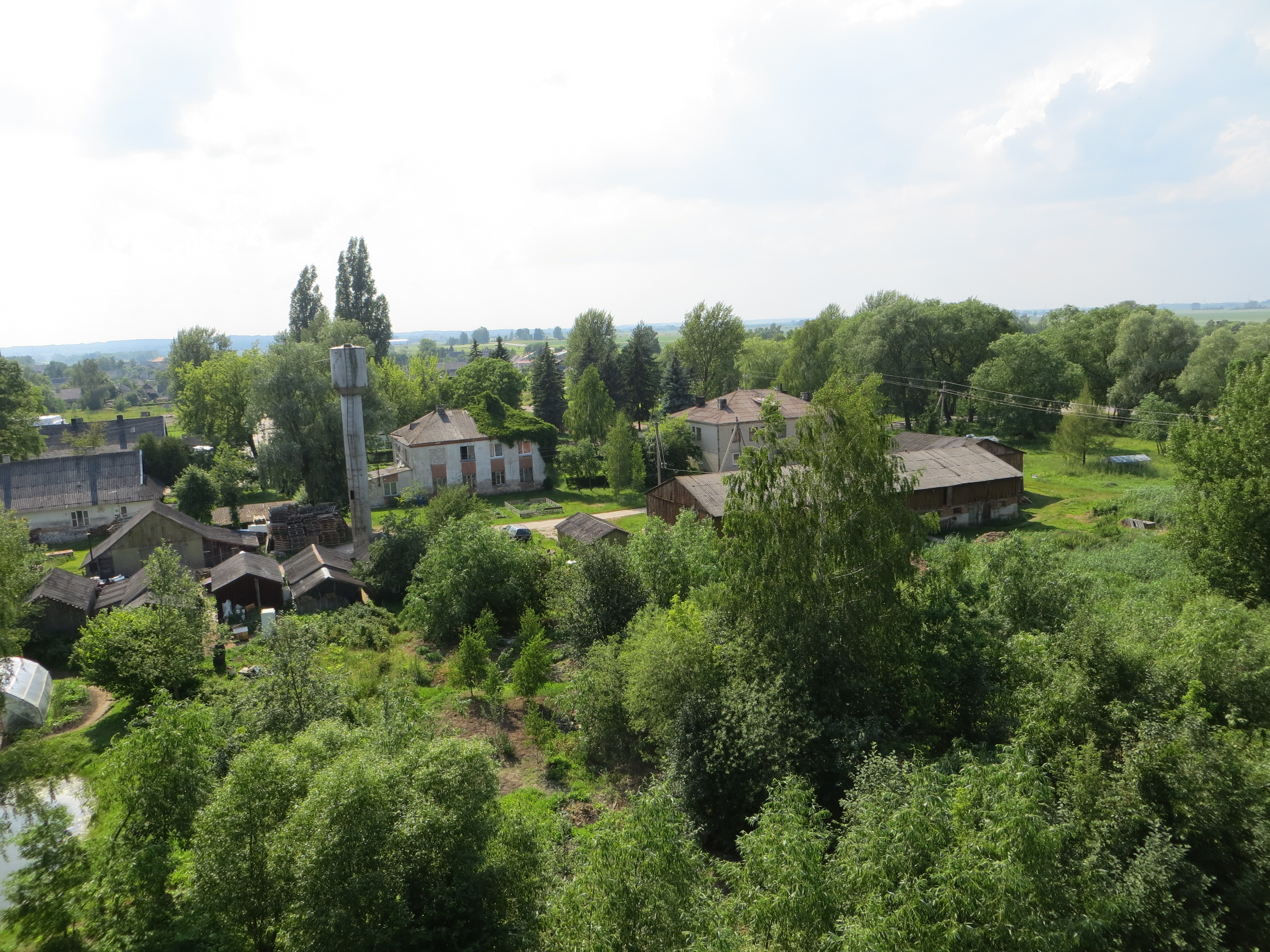 Mergalaukis 64304, Lithuania